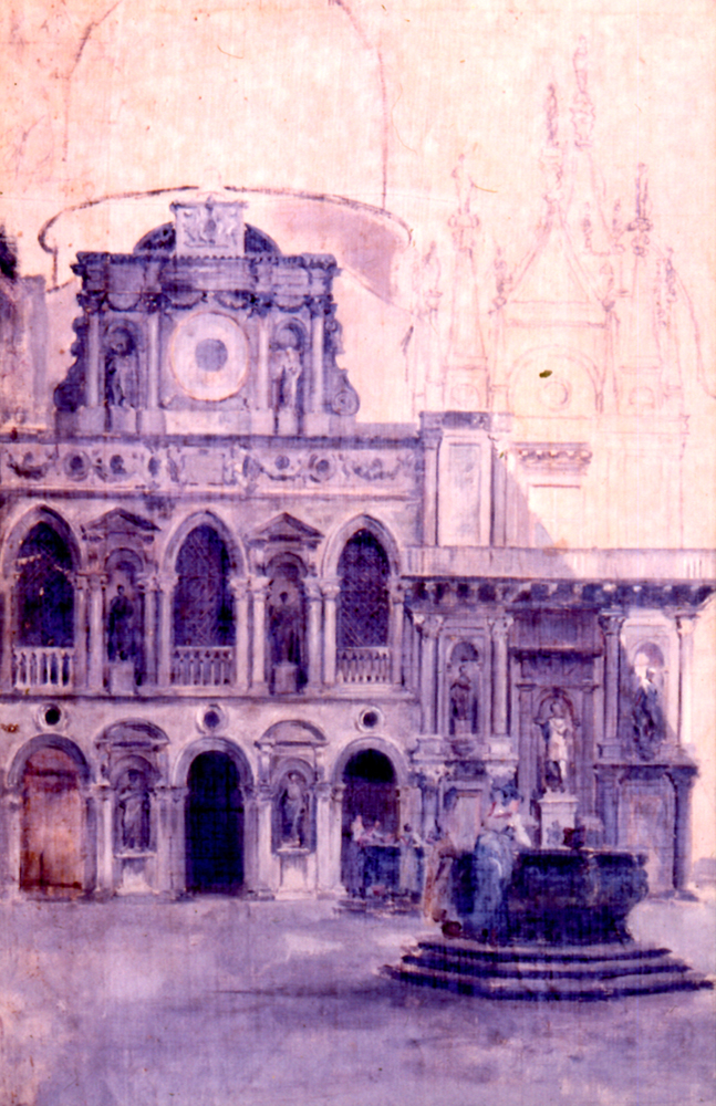 Boceto de tema italiano de Eugenio Oliva y Rodrigo, realizado entre 1879 y 1883